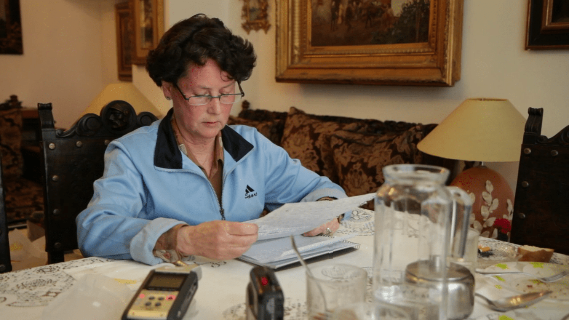 Fotograma del ensayo fílmico, en formato cortometraje, Shakespeare no estuvo allí de Isabel Medarde. En el fotograma se puede ver a Marisa Oliden Mata durante la entrevista que la autora realizó para este trabajo en su propia casa de León. Año 2014.